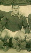 Indalecio López en Central Córdoba